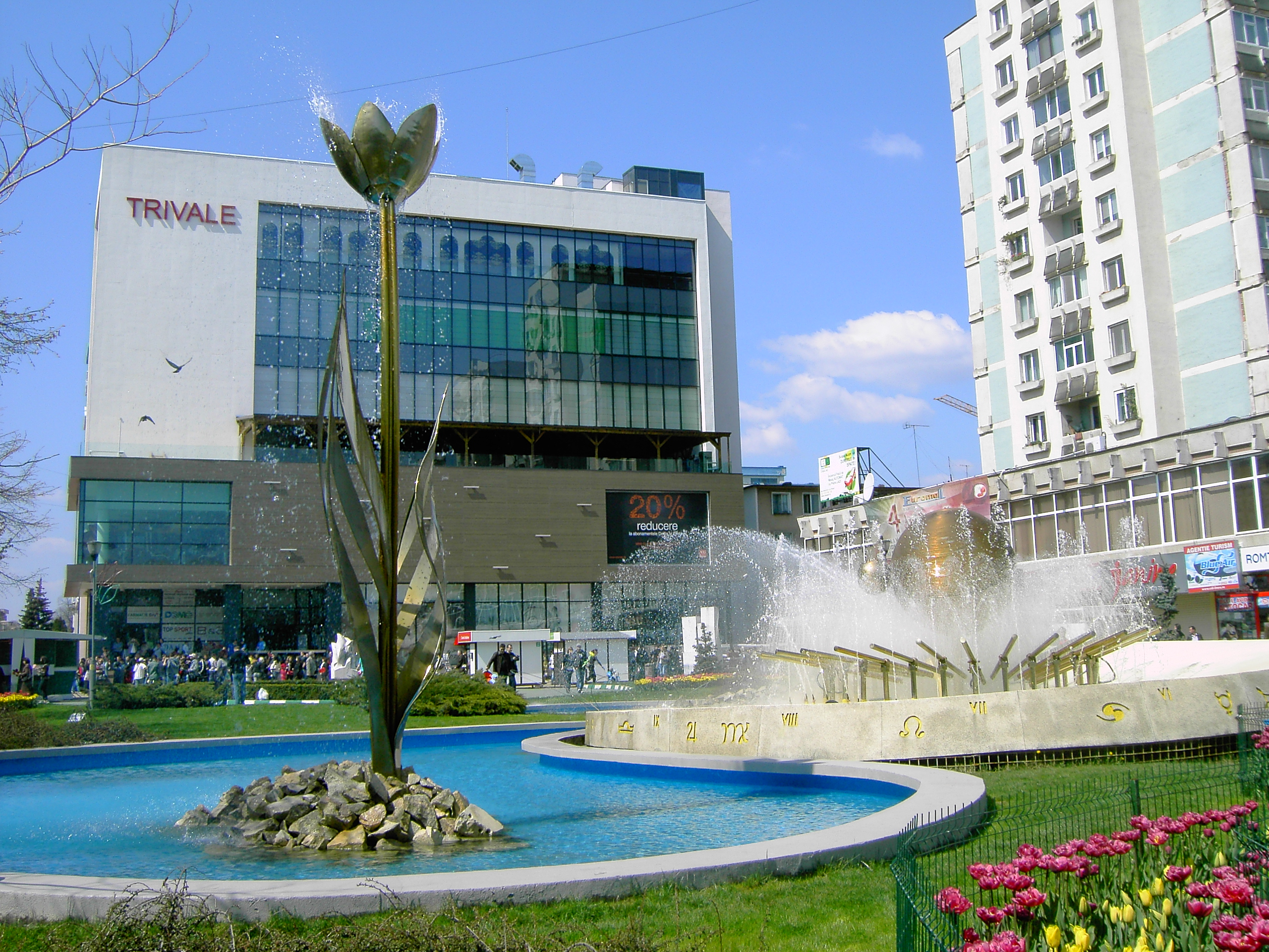 center of town Pitesti